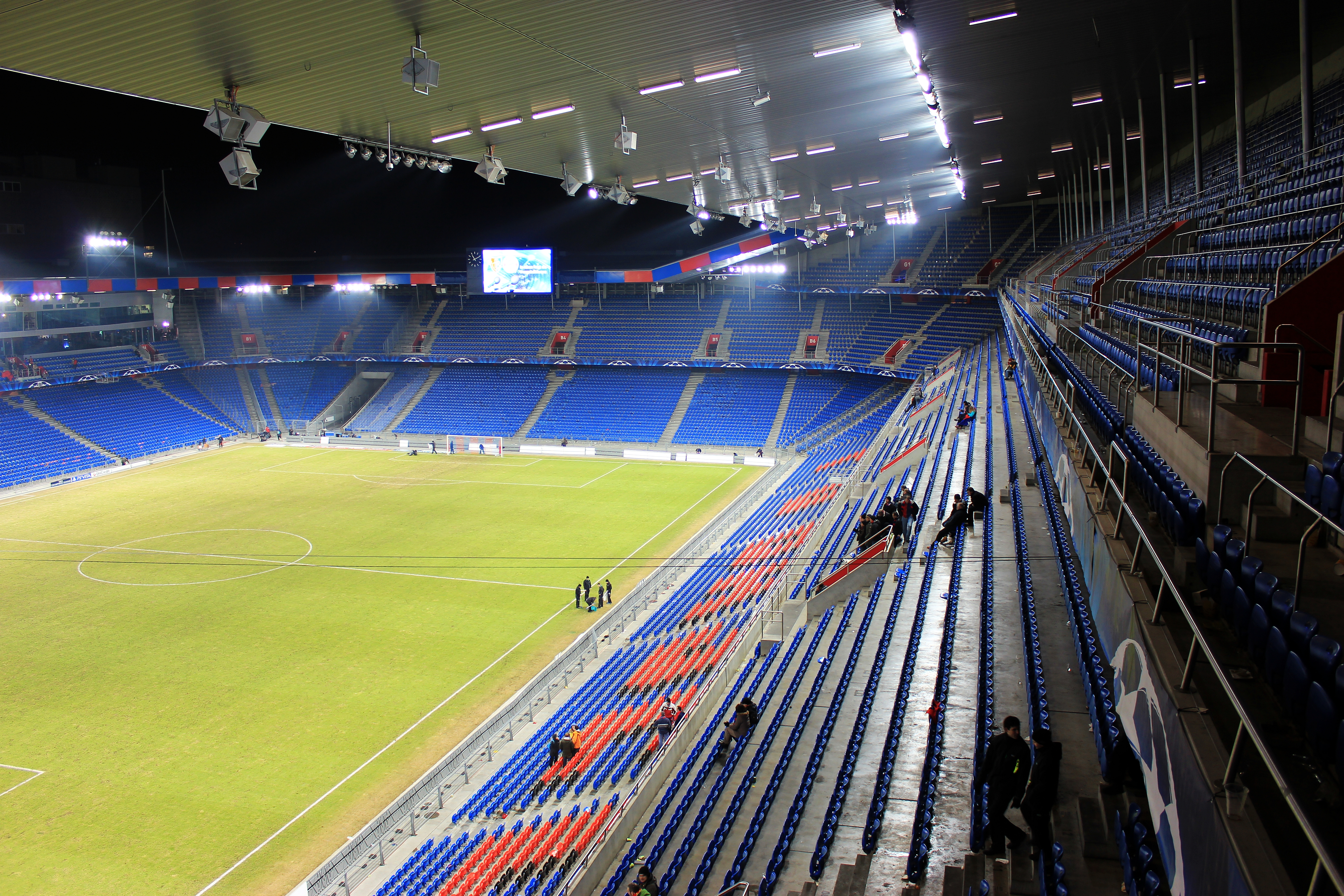 Basel, St. Jakob-Park.